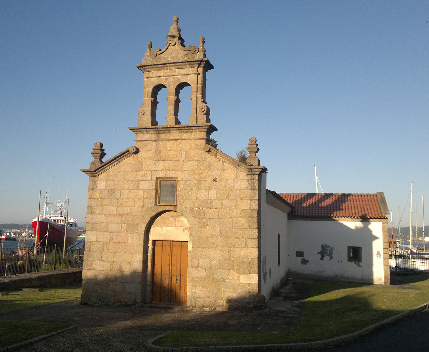 Capela de Santa María de Oza, construída no antigo concello de Santa María de Oza, o cal foi anexionado polo concello da Coruña en 1912. A capela foi contruída no século XII e foi reformada no século XVI.